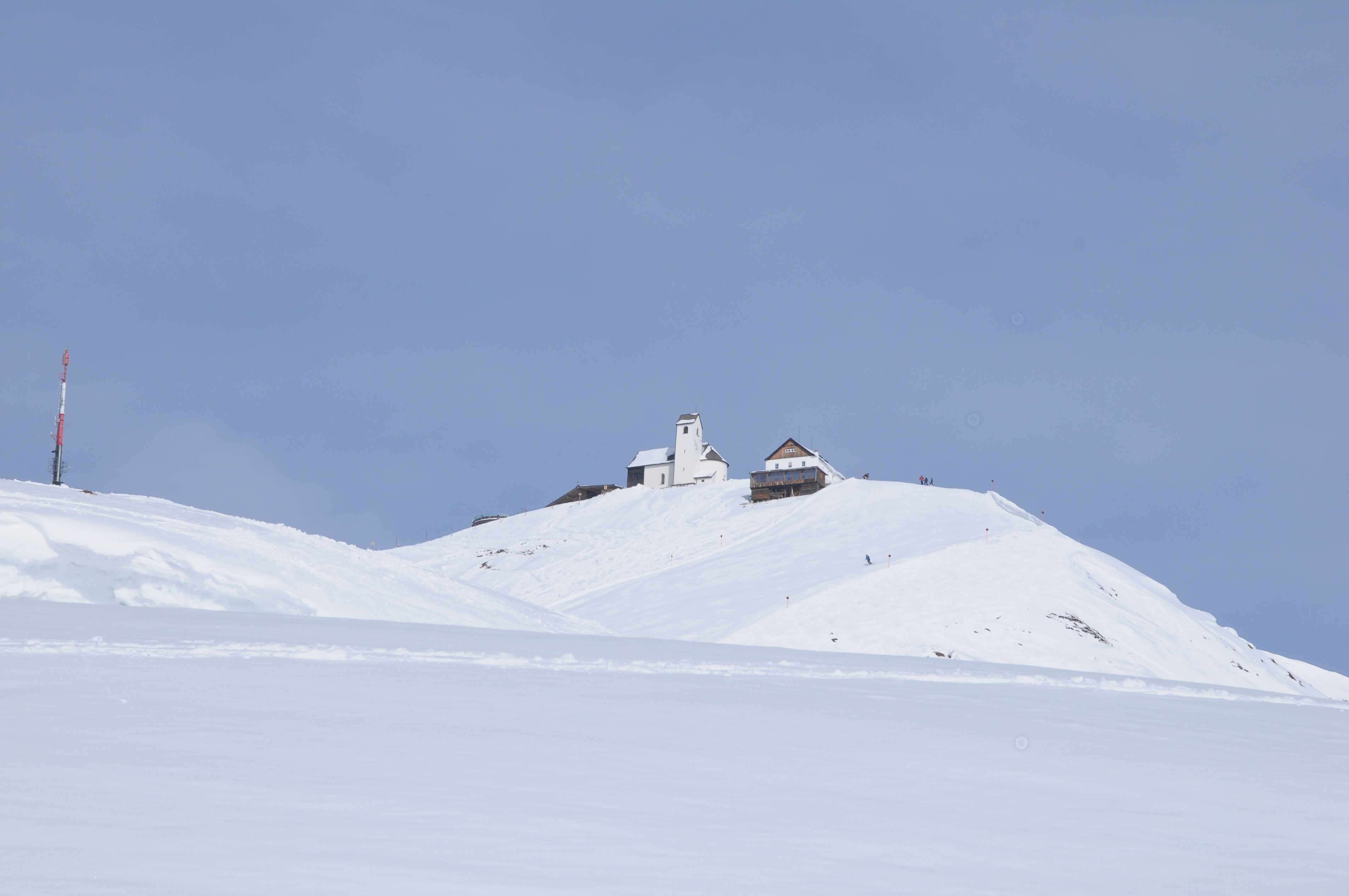 Wallfahrtskapelle zum hl. Johann auf der Hohen Salve, Salvenkirchl